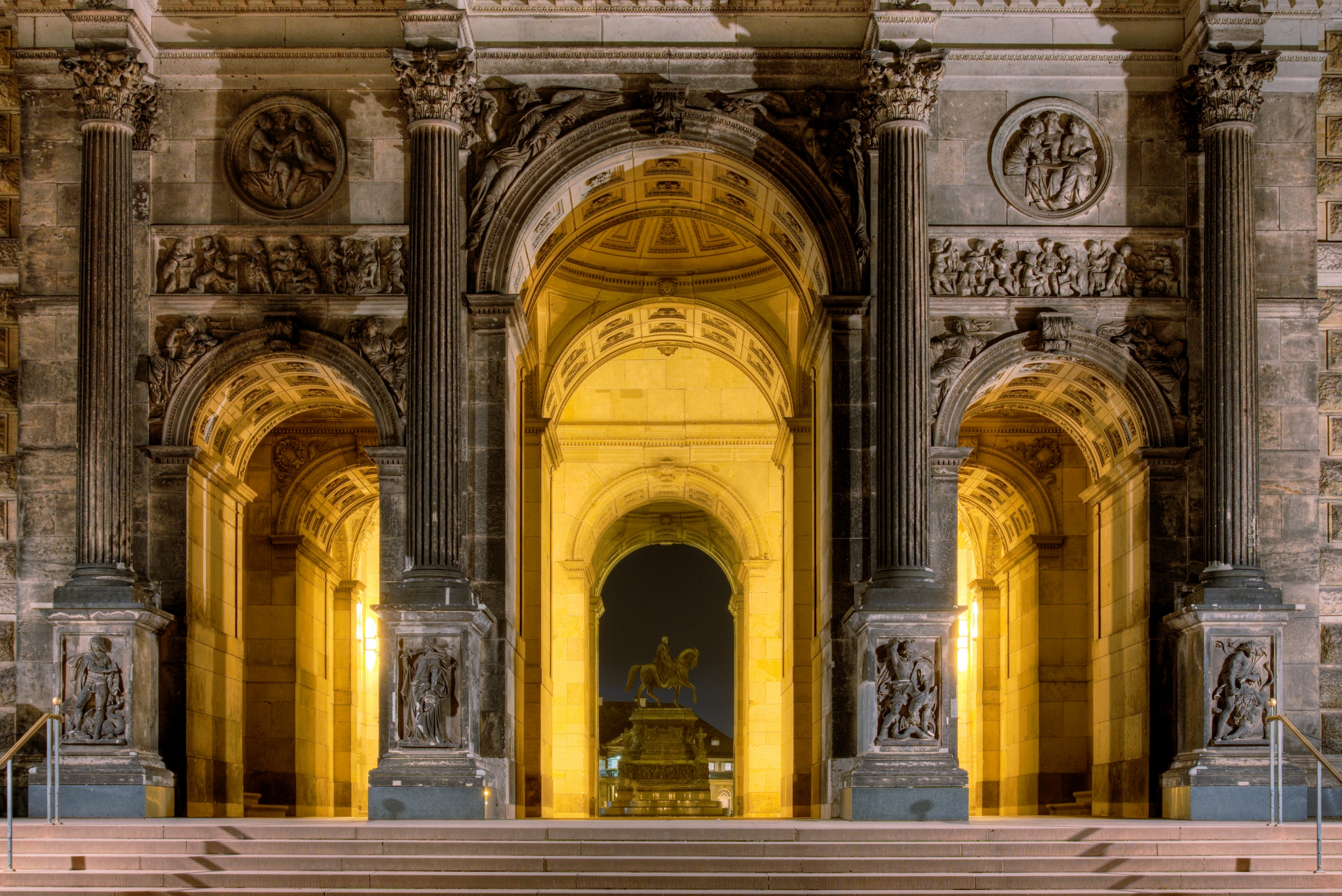 Portal der Sempergalerie